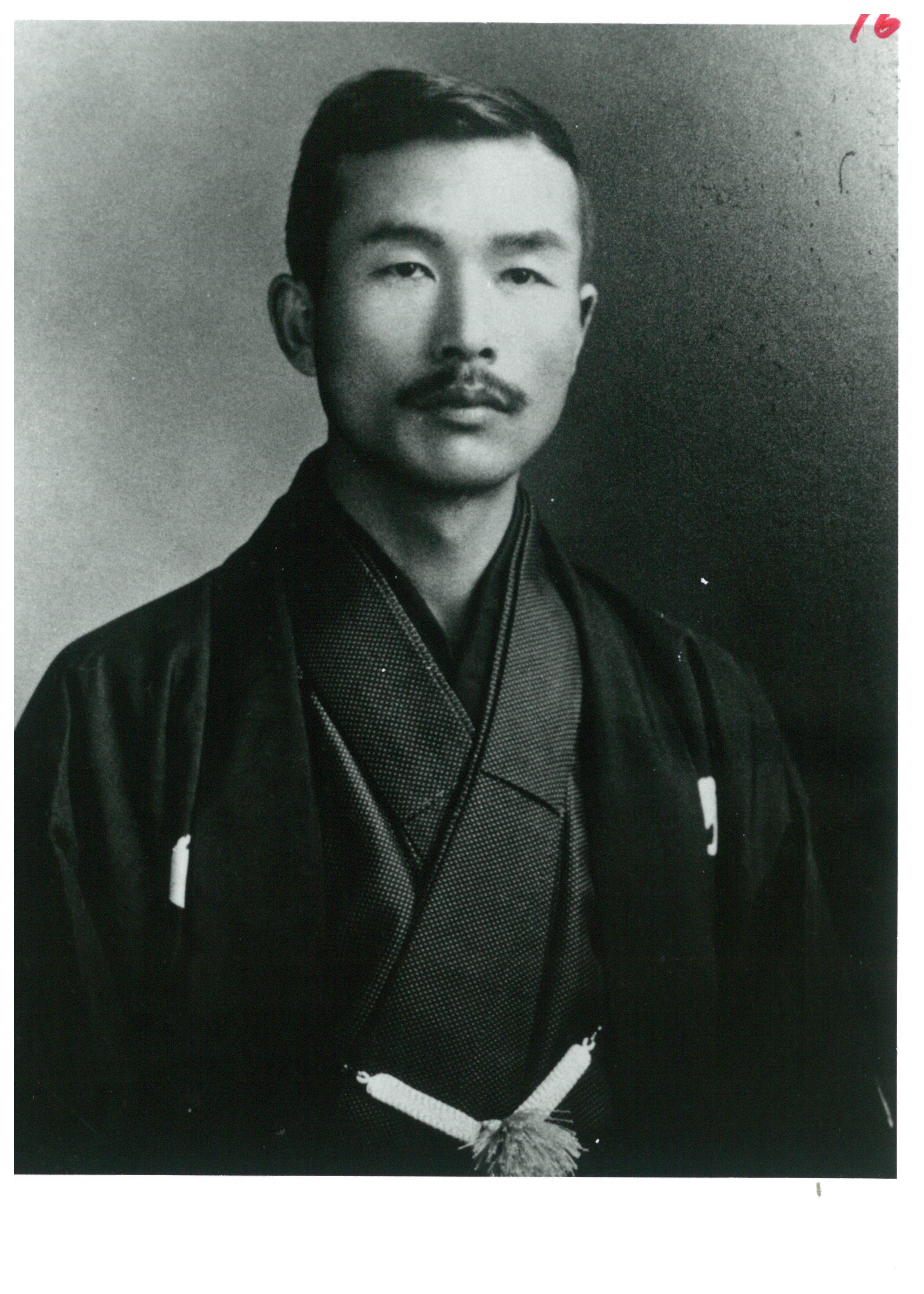 40歳当時の坂田祐 学院史資料室ニューズ・レターNo21にて掲載の写真